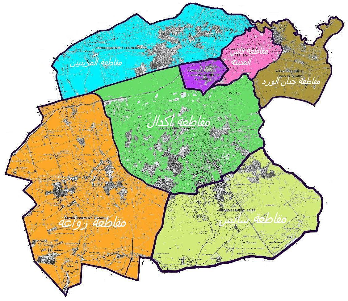 ااؤيل